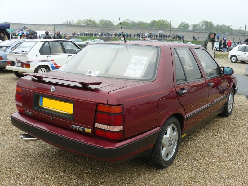 Français cadien: Montlhery Avril 2012